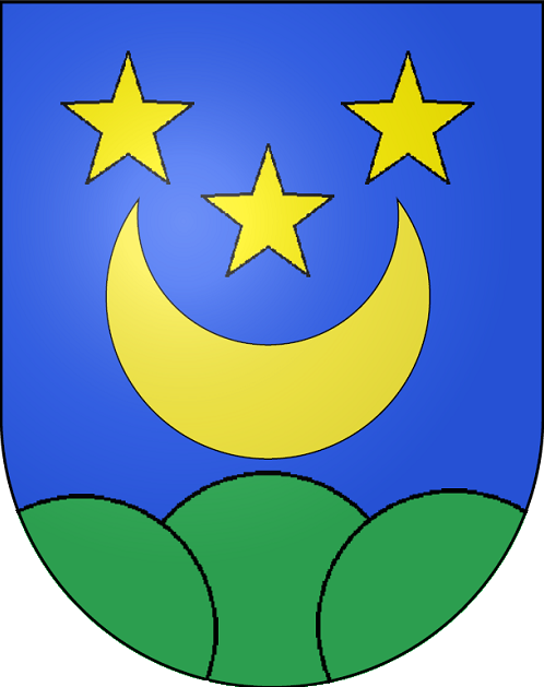 Blason de la famille Petitpierre, en Suisse